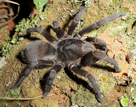 Acanthoscurria gomesiana, female.